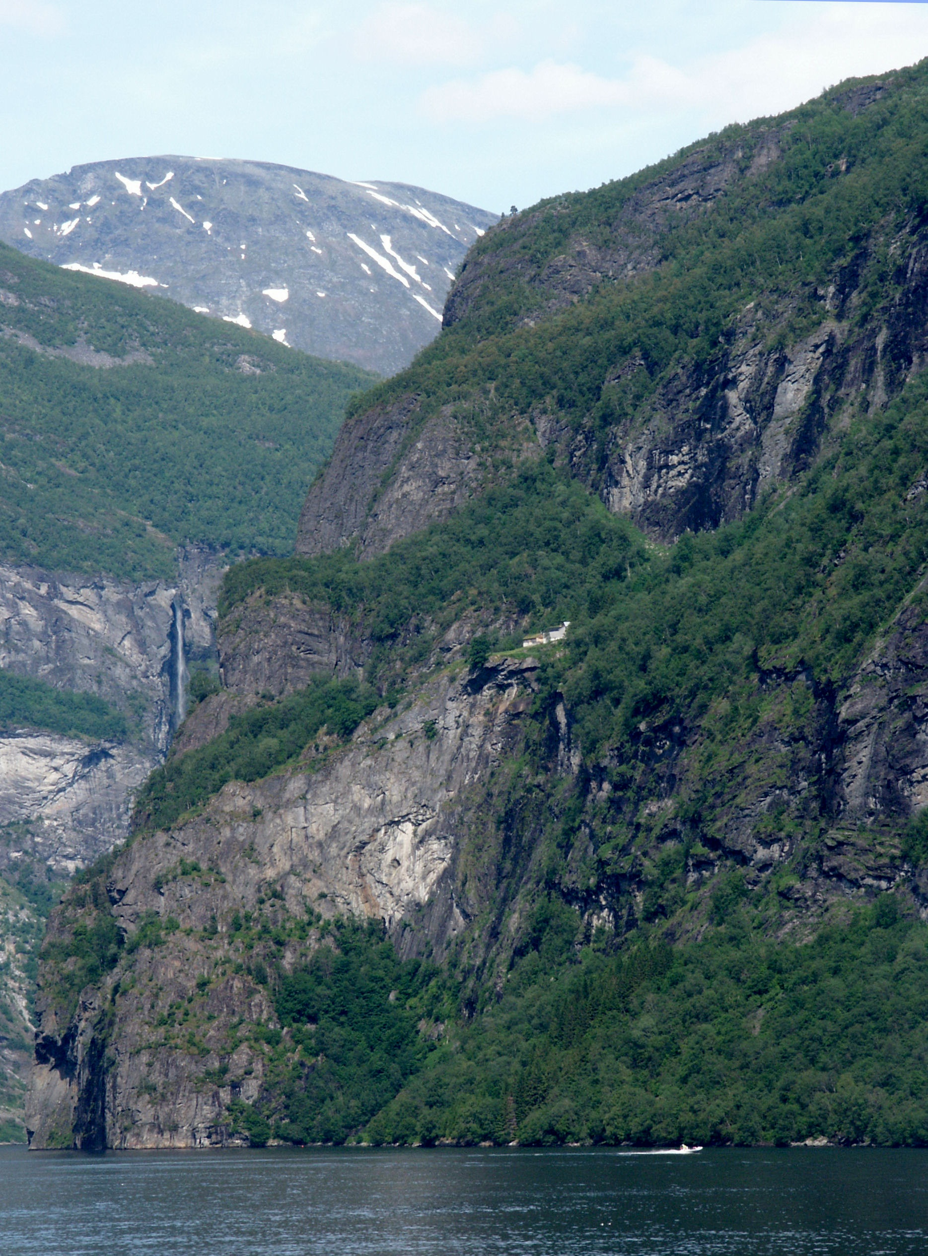 Skageflå